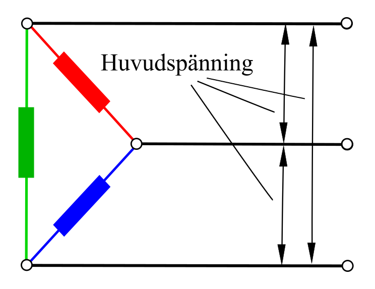 Trefaskoppling, D-koppling